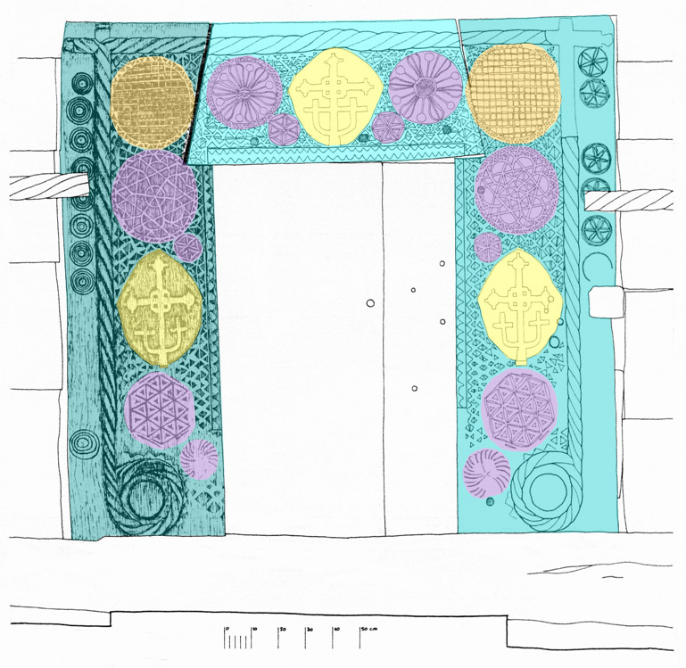 Desen în culori al portalului bisericii de lemn din Sârbi Susani, Maramureş. Autor: ALexandru Baboş.